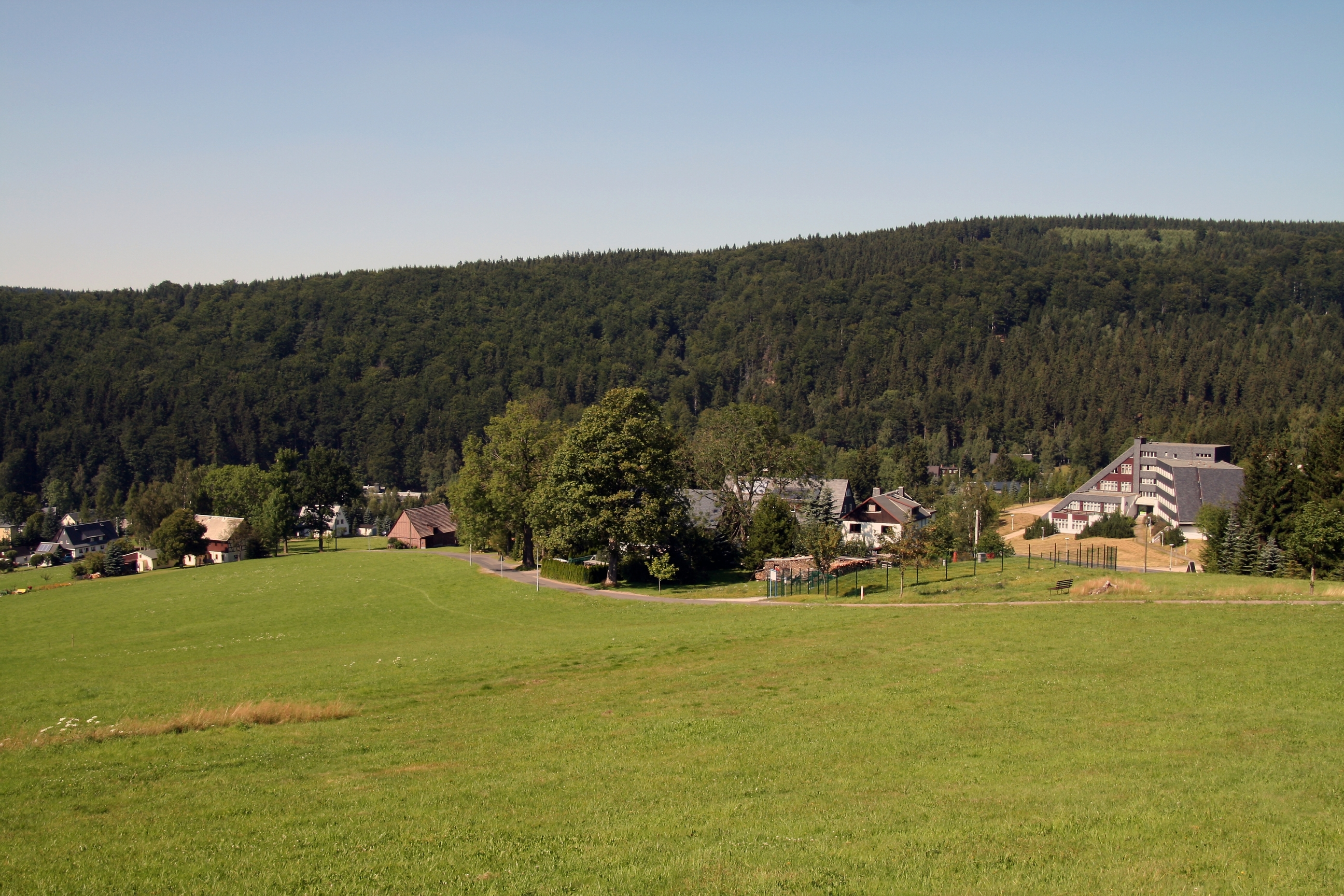 Holzhau, Ore Mountains, Erzgebirge, Saxony